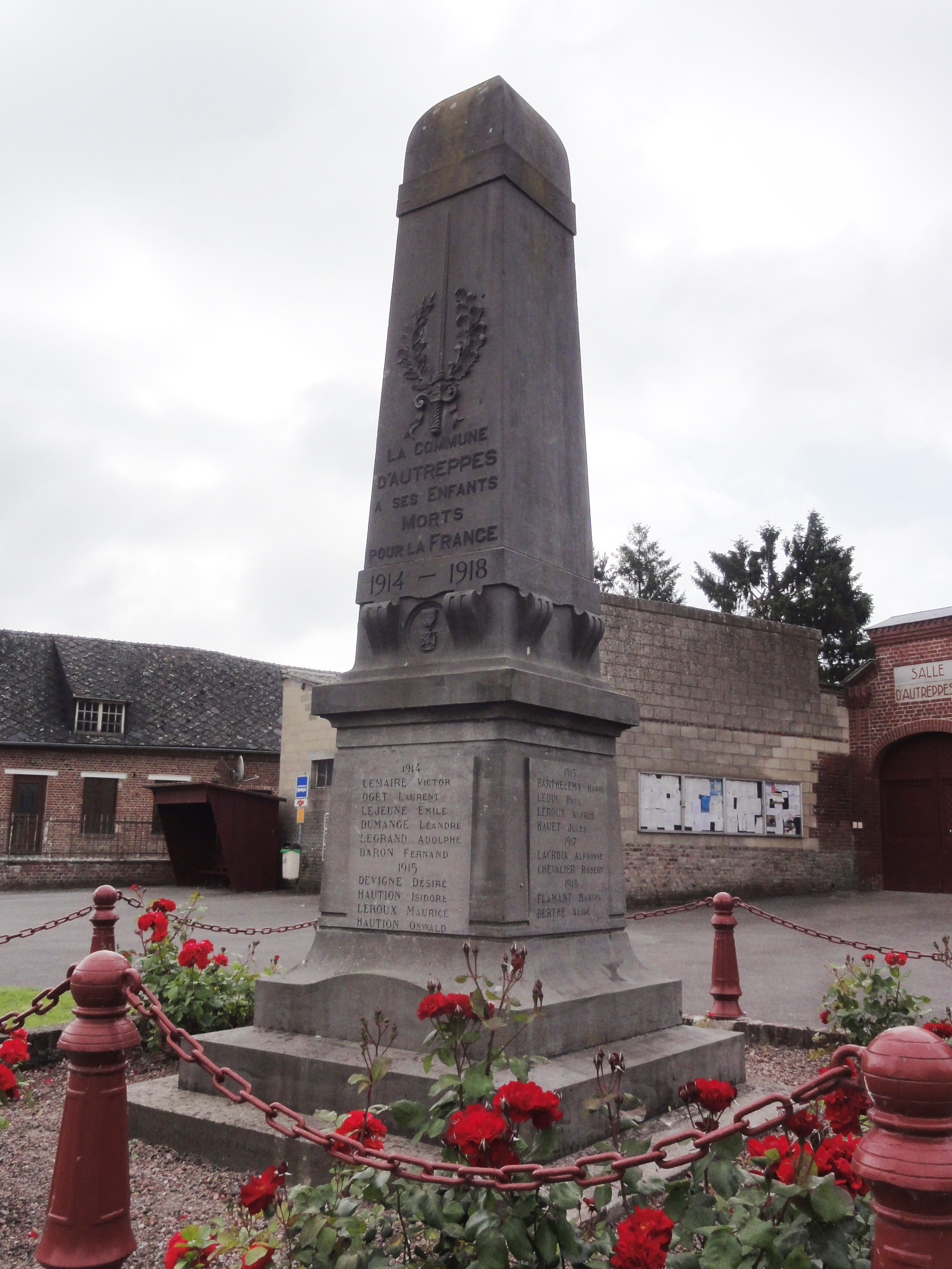 Autreppes (Aisne) monument aux morts